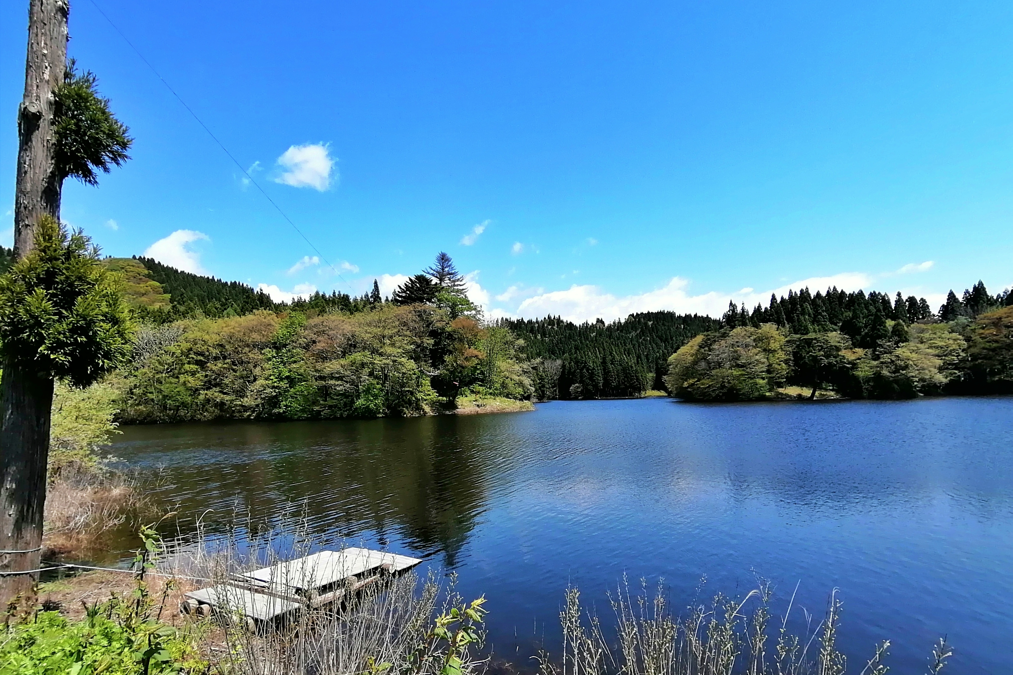 今泉大堤（今泉緑地環境保全地域）-北秋田市今泉